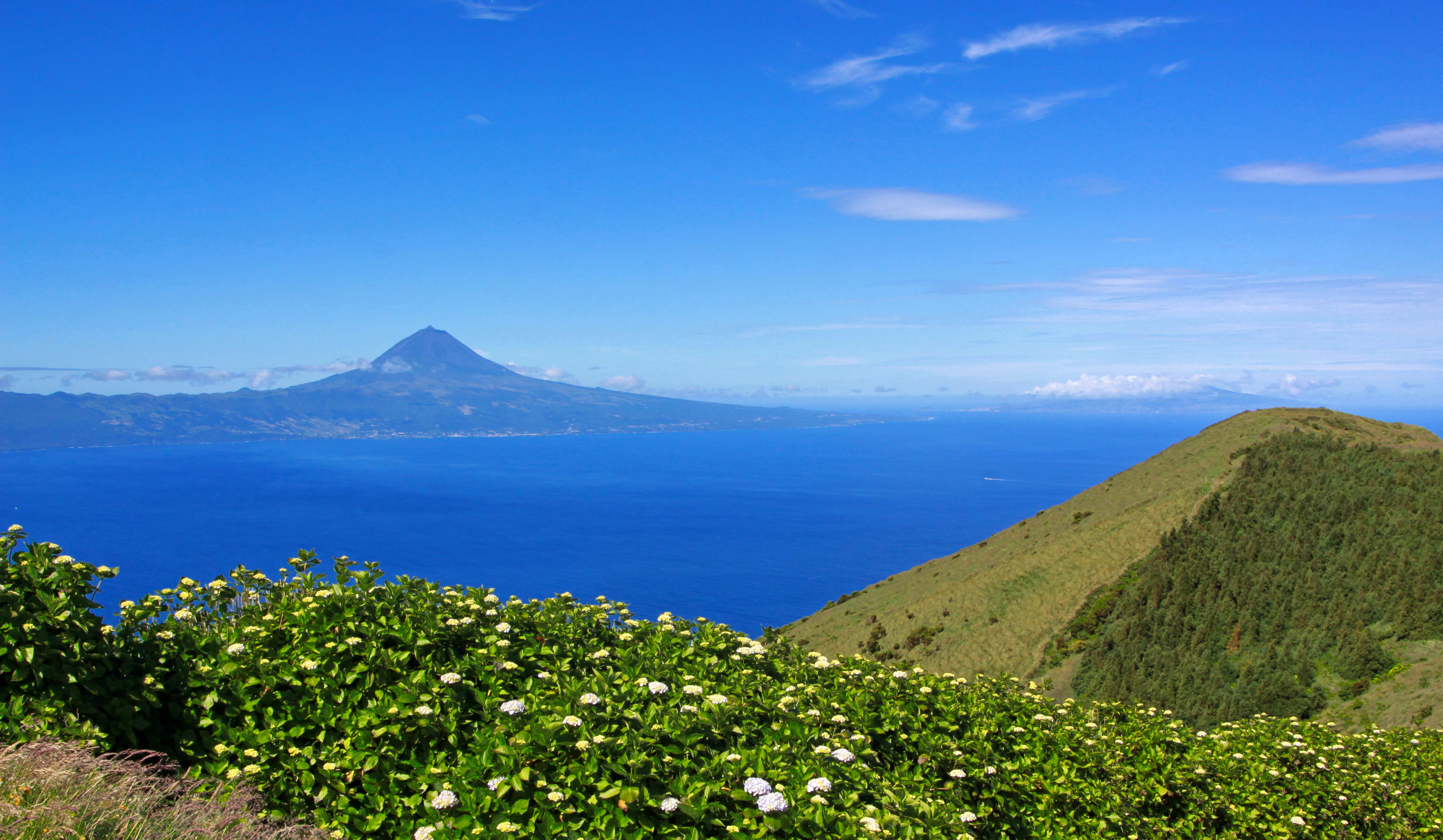 Ilha de São Jorge, Açores. Vue côté sud vers Pico.